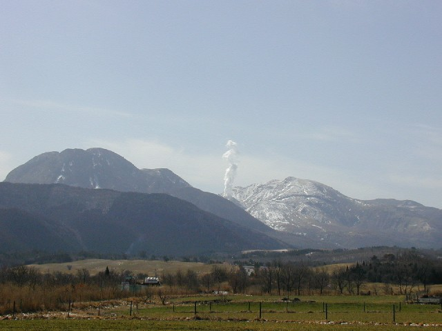 Mount Kuju.